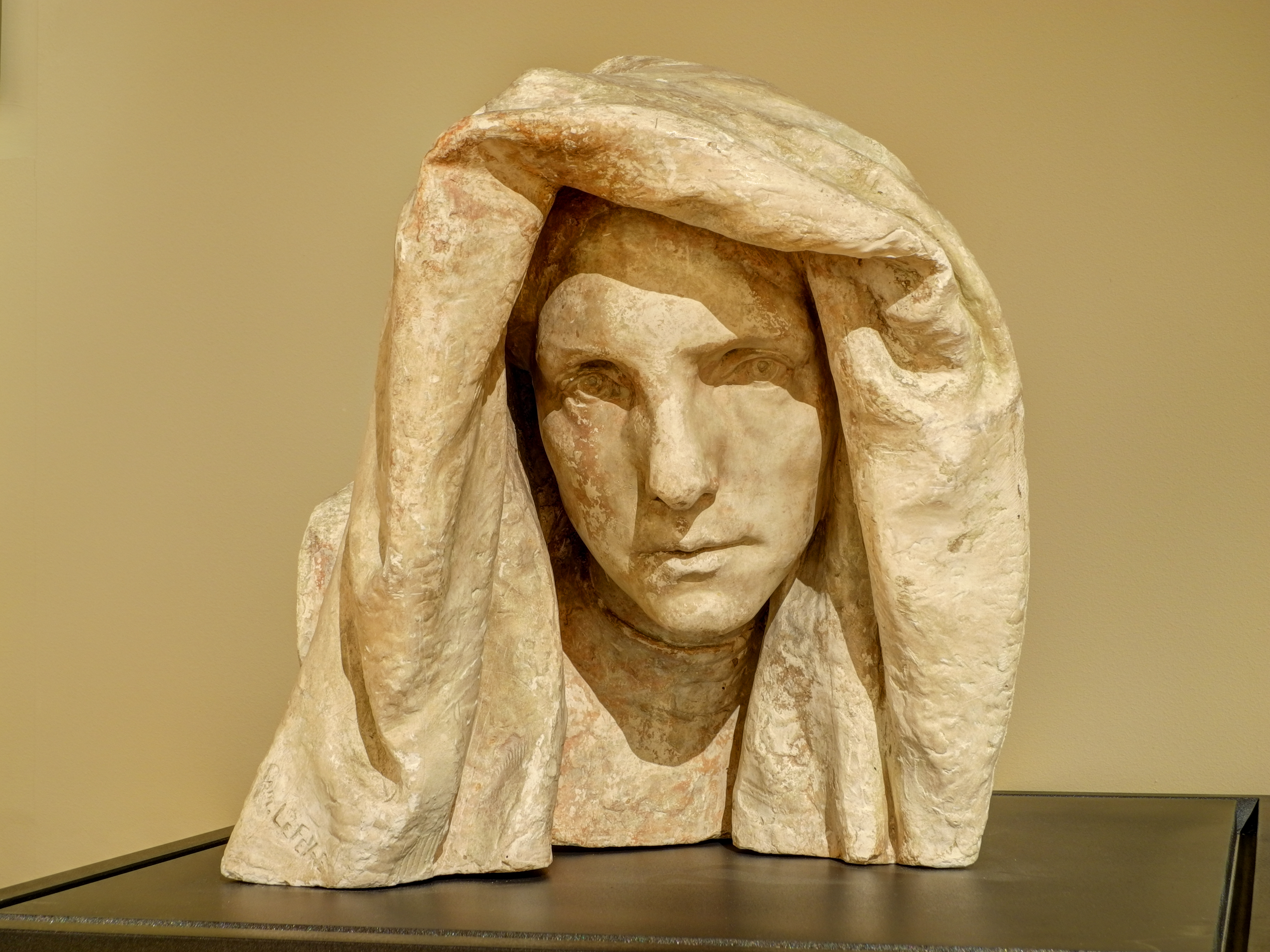 Musée des Beaux-Arts : Le remord (HDR). Camille Lefevre (1853 - 1933). Tête en plâtre, XXe siècle Inv n° CLS22